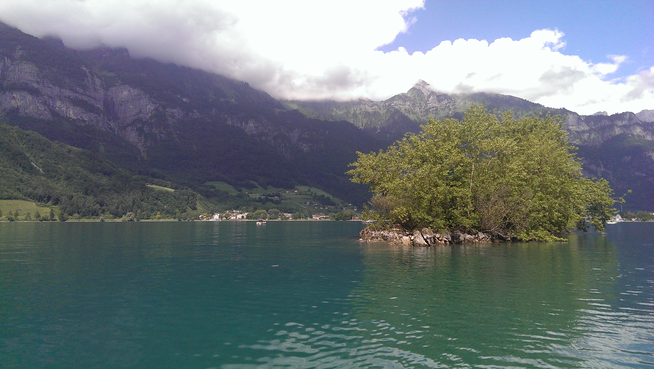 Schnittlauchinsel mit Blick auf Walenstadt